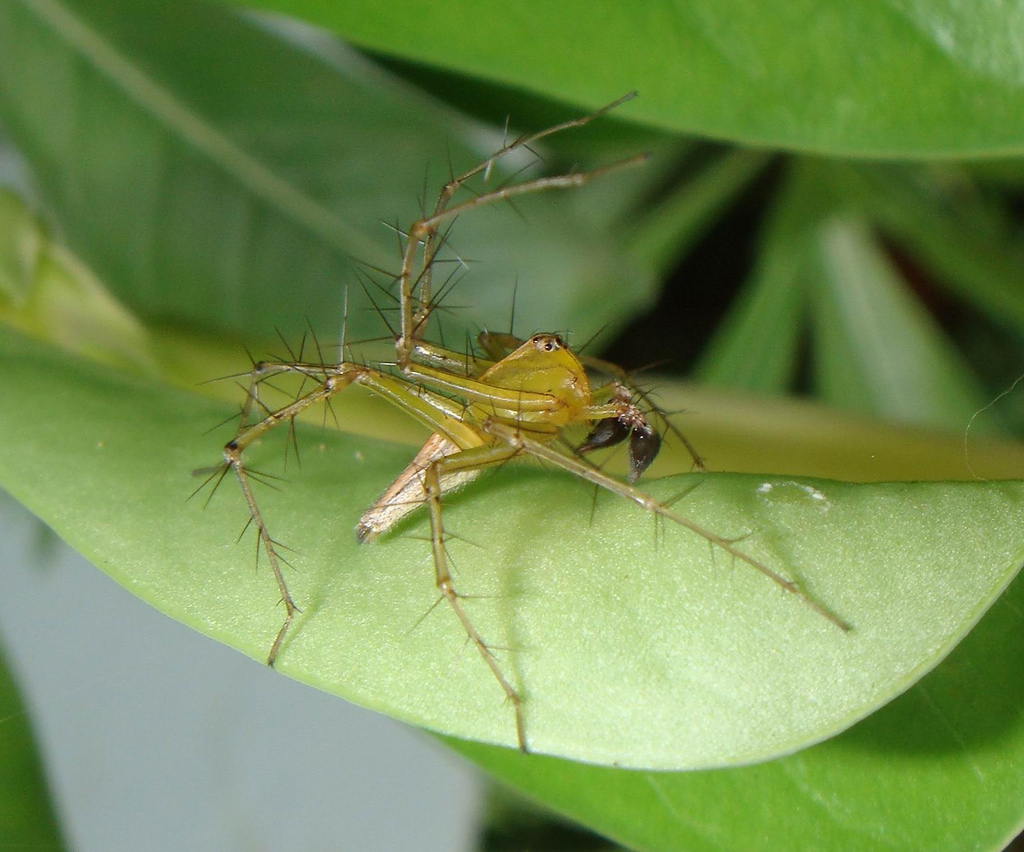 Lynx spider